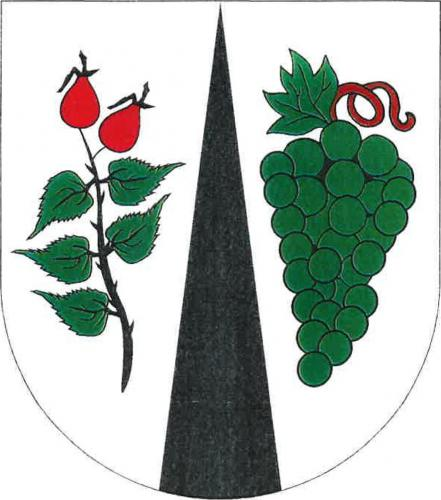 Trnovany, okres Litoměřice, znak